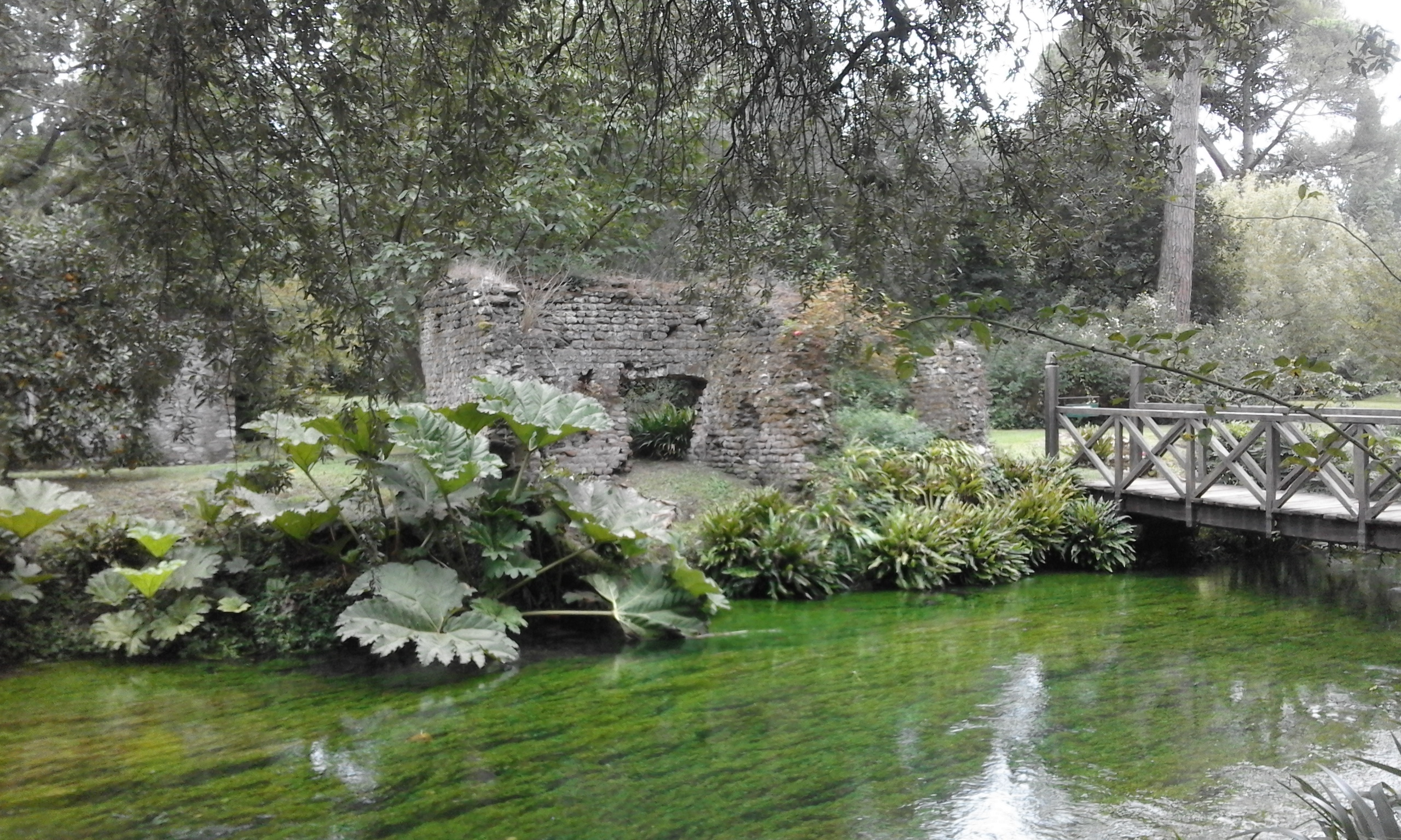 Giardino di Ninfa This is a photo of a monument which is part of cultural heritage of Italy.